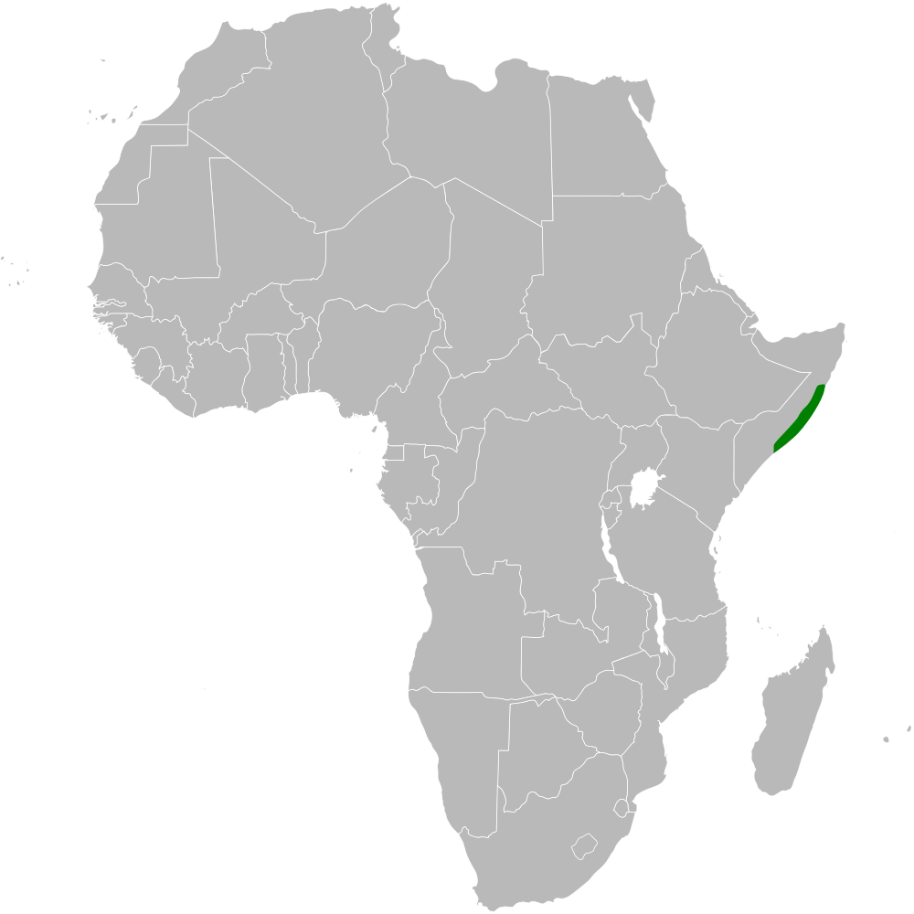 Spizocorys obbiensis distribution map; using BlankMap-Africa.svg, based on